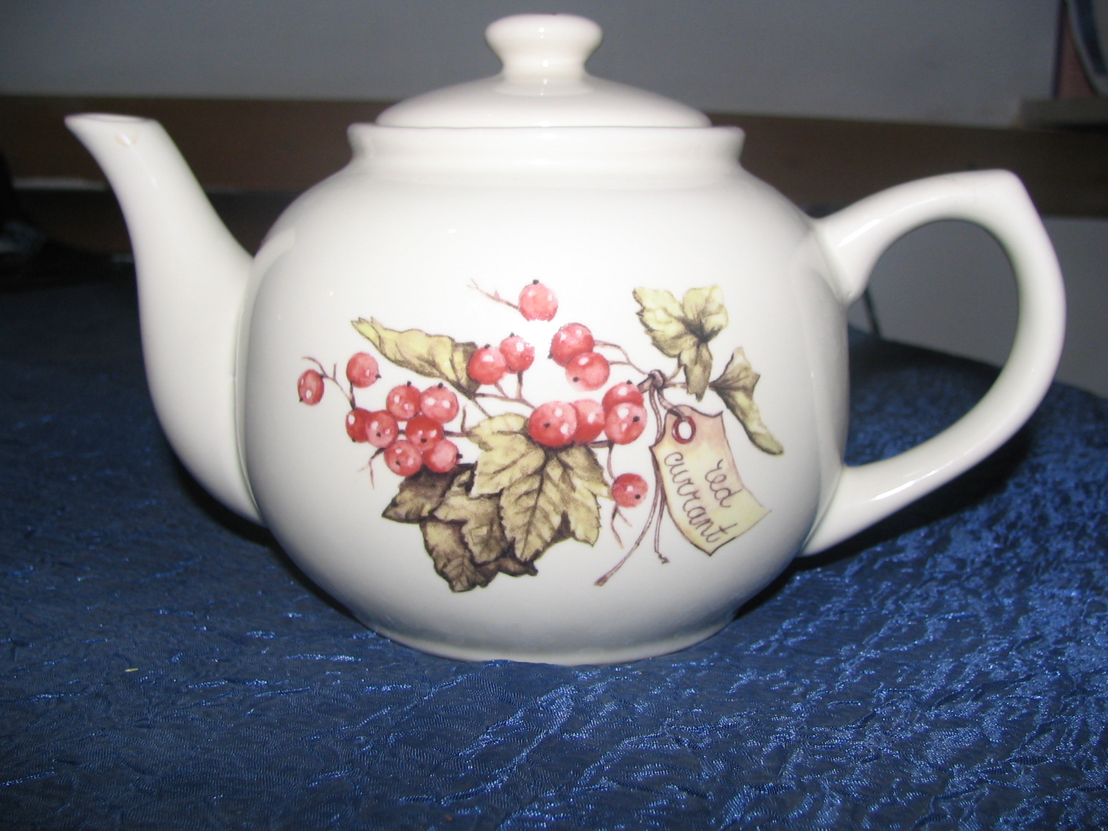 A Porcelain Teapot